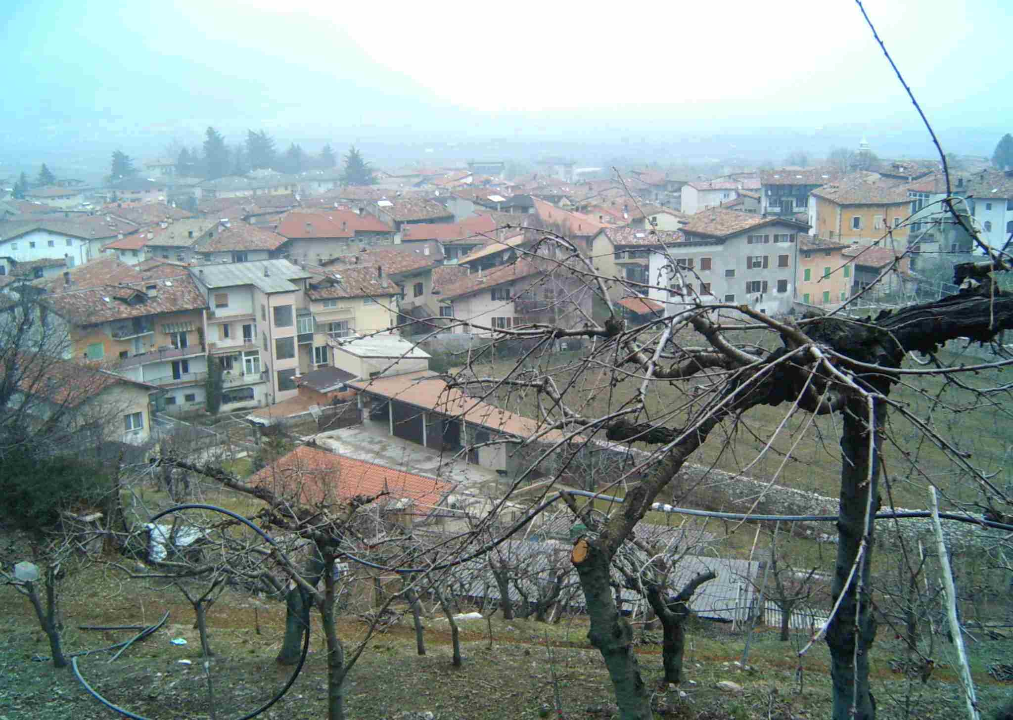 Veduta di Volano (provincia di Trento)